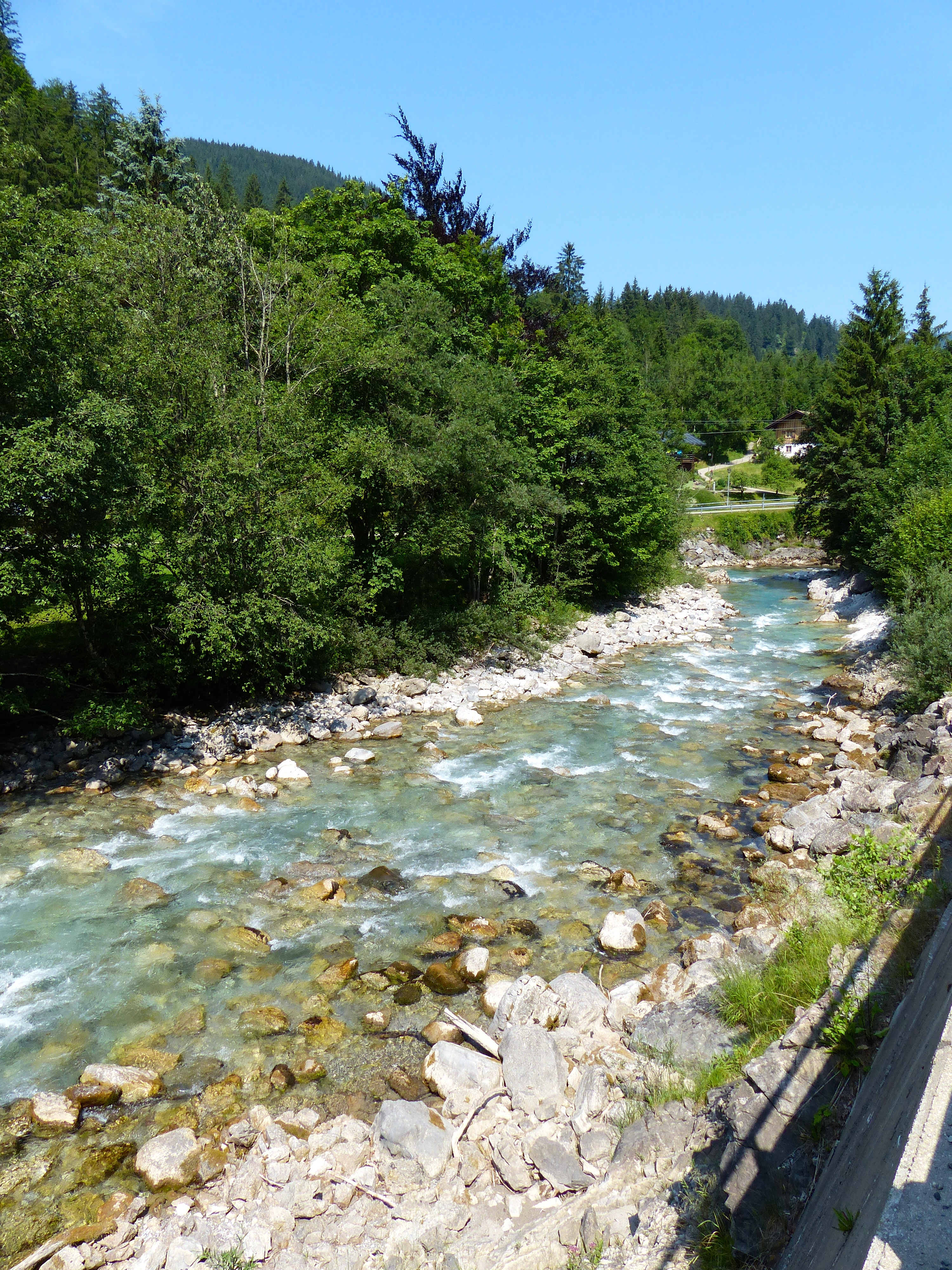 Ostrach oberhalb Bad Hindelang (NSG Allgäuer Hochalpen)